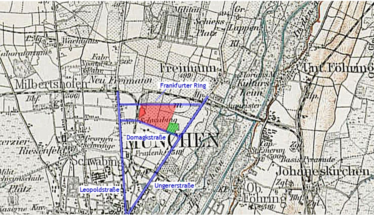 Historische Karte München von 1894 mit ungefährer Lage des Domagkparks, Bild wurde nachträglich bearbeitet